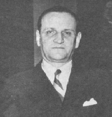 Hernán Videla Lira